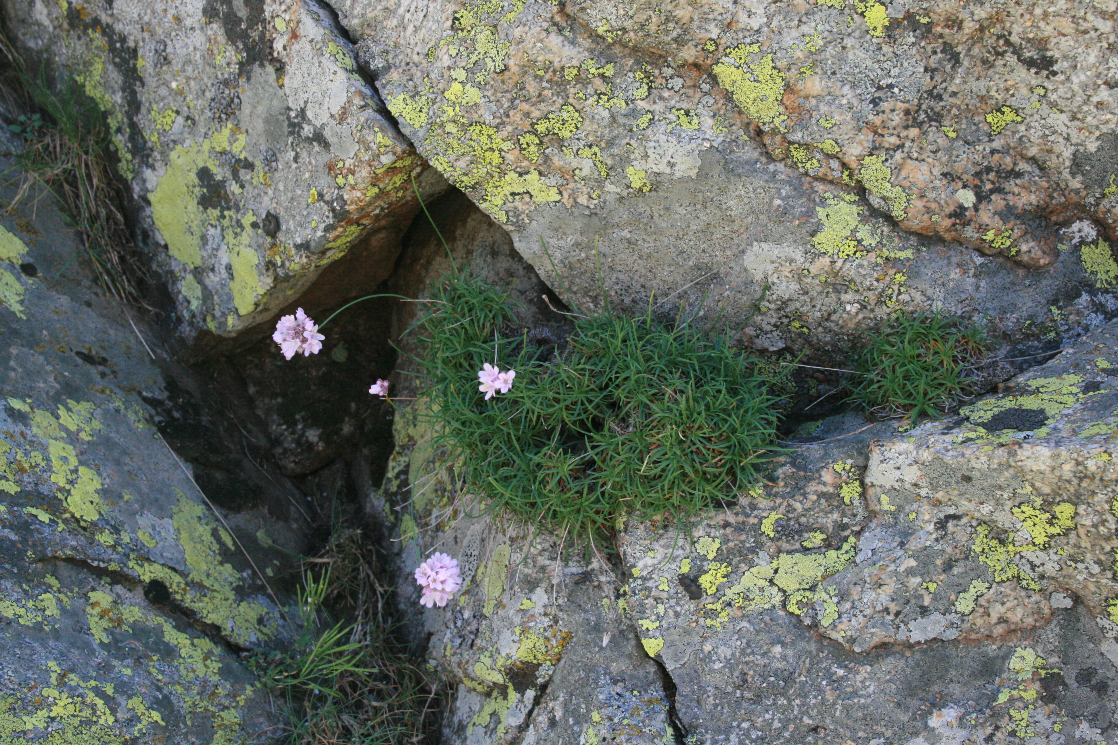 Flora (gen. Armeria) en las inmediaciones de la Laguna Grande del Circo de Gredos en la Sierra de Gredos. España. Armeria bigerrensis subsp. bigerrensis (Pau ex C. Vicioso & Beltrán) Rivas Mart. This is a photography of a Special Area of Conservation in Spain with the ID: ES4110002. Natura2000 entry, EEA entry